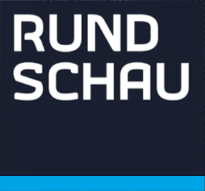 Logo der Rundschau ab 11. April 2016